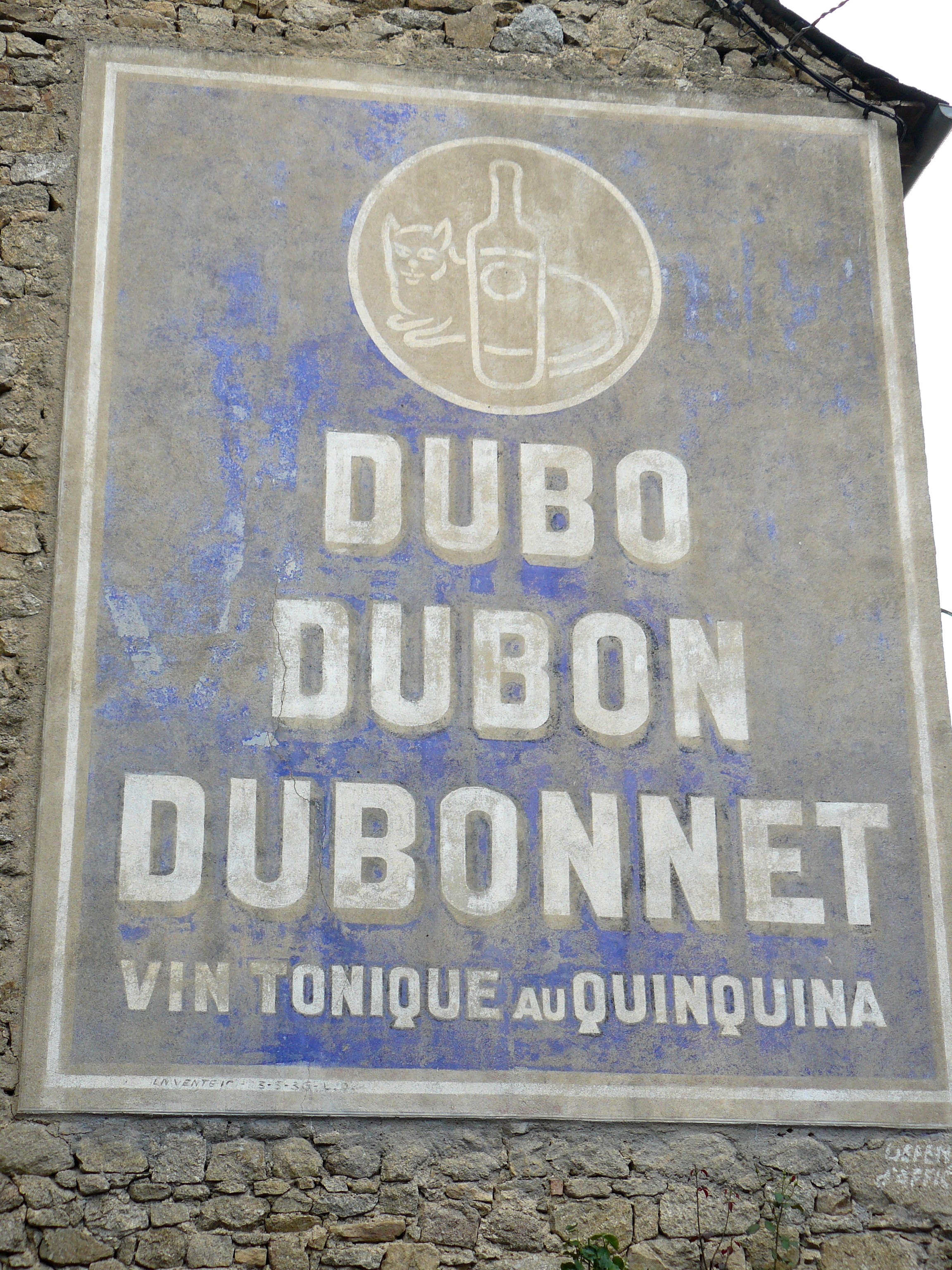 Réclame murale ancienne pour Dubonnet